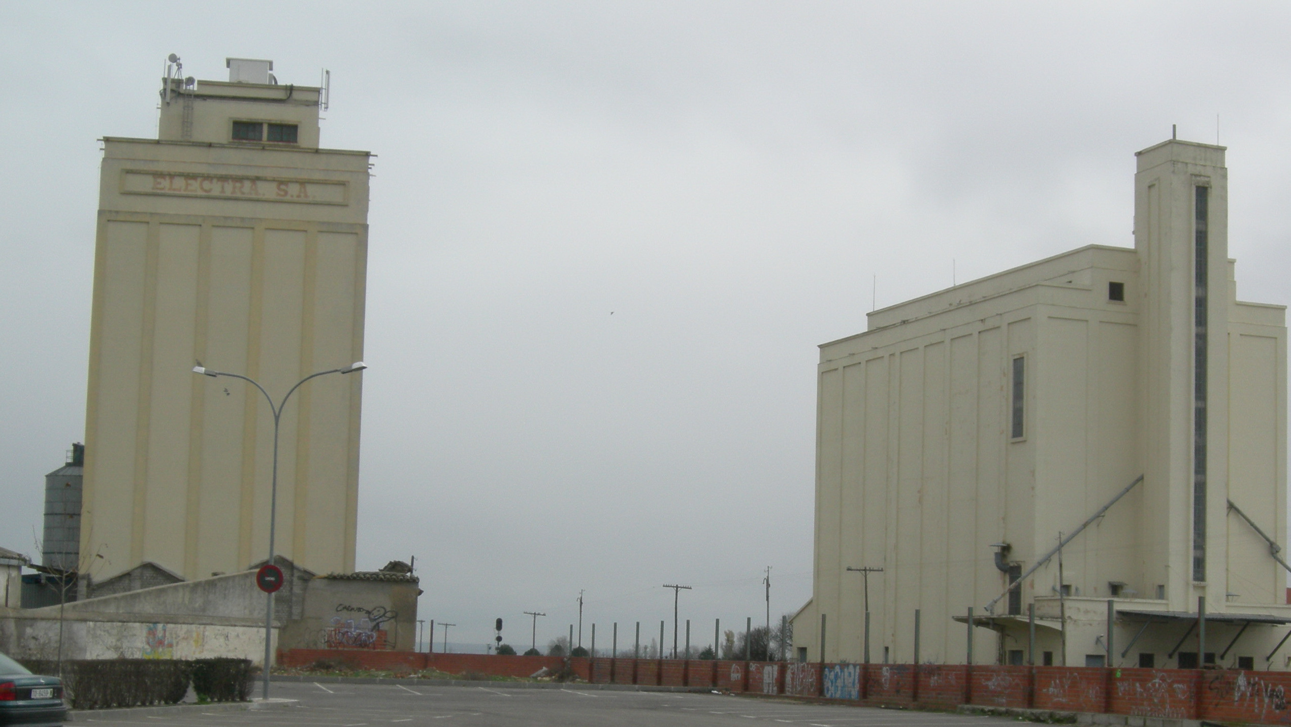 Silos en Torrijos (Toledo)